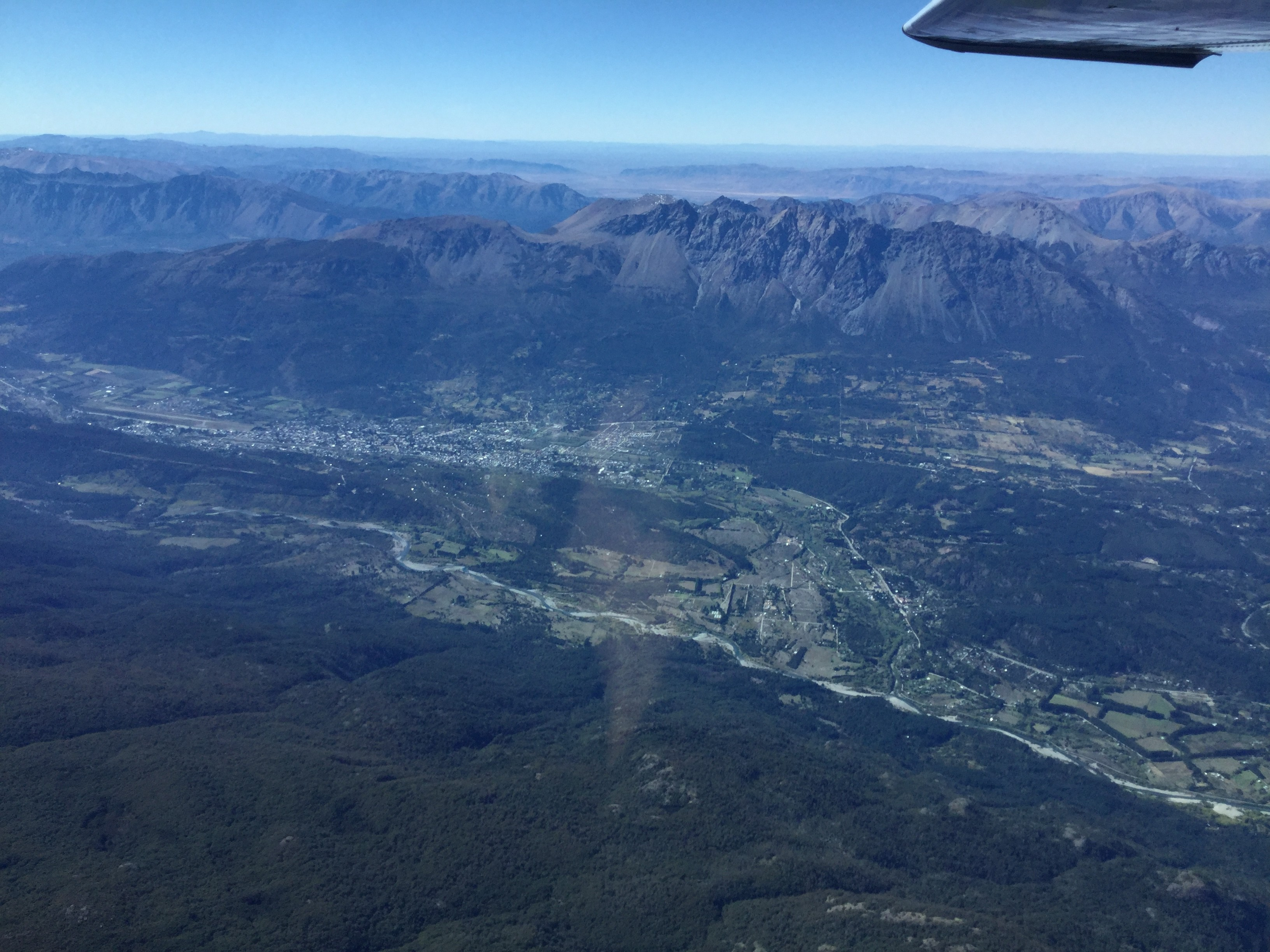 Vista aérea de la Comarca del Paralelo 42, que divide las provincias de Chubut y Río Negro. A la izquierda se ve la ciudad de El Bolsón, a la derecha los parajes Las Golondrinas, Entre Ríos y Cerro Radal. Detrás el cordón del cerro Piltriquitrón, está el valle del Río Chubut donde se encuentra la localidad de El Maitén. Abajo se ve el curso del Río Azul y la desembocadura del Quemquemtreu en el mismo